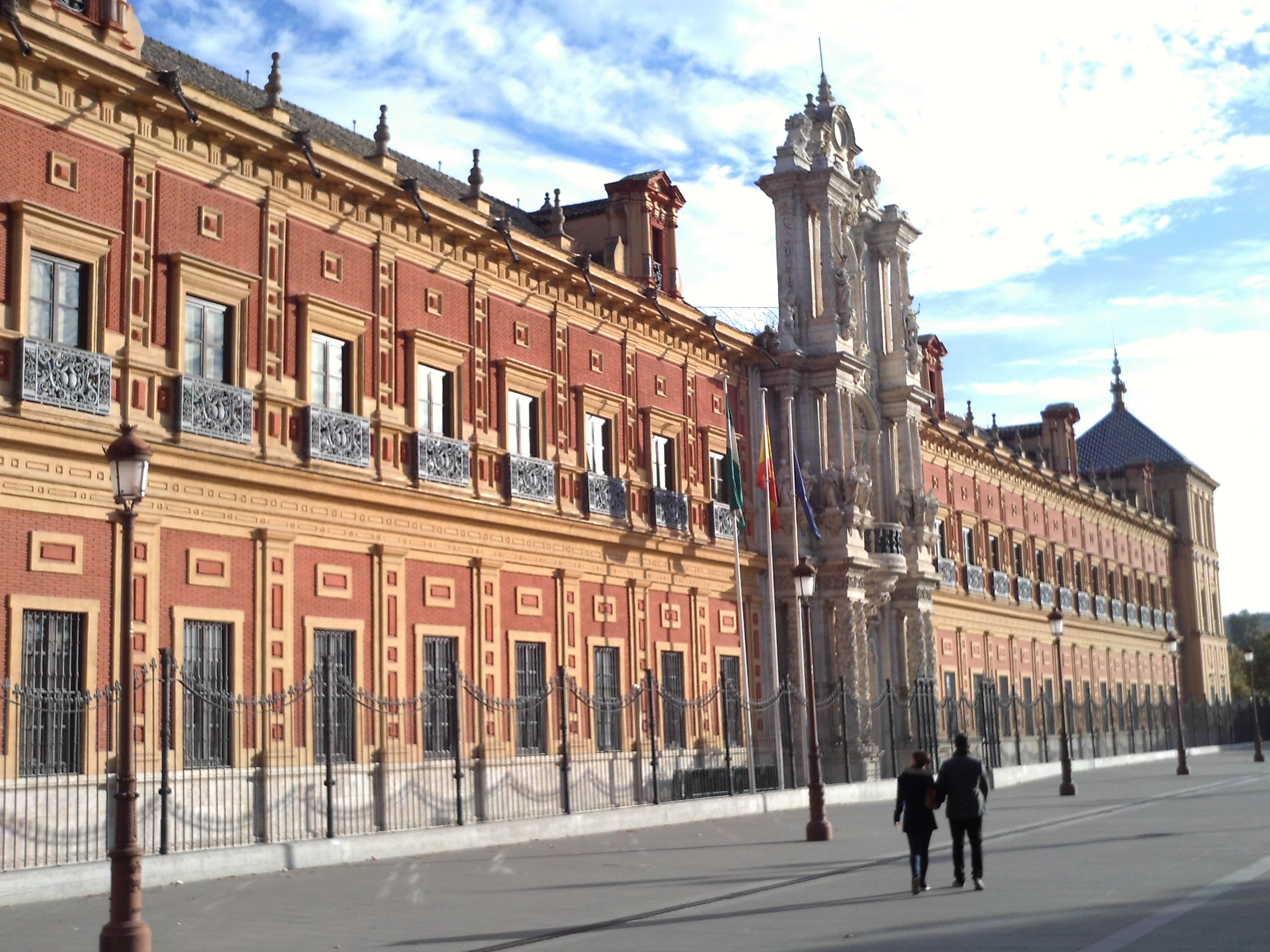 Palacio de San Telmo. Avenida de Roma. Sevilla, Andalucía, España.